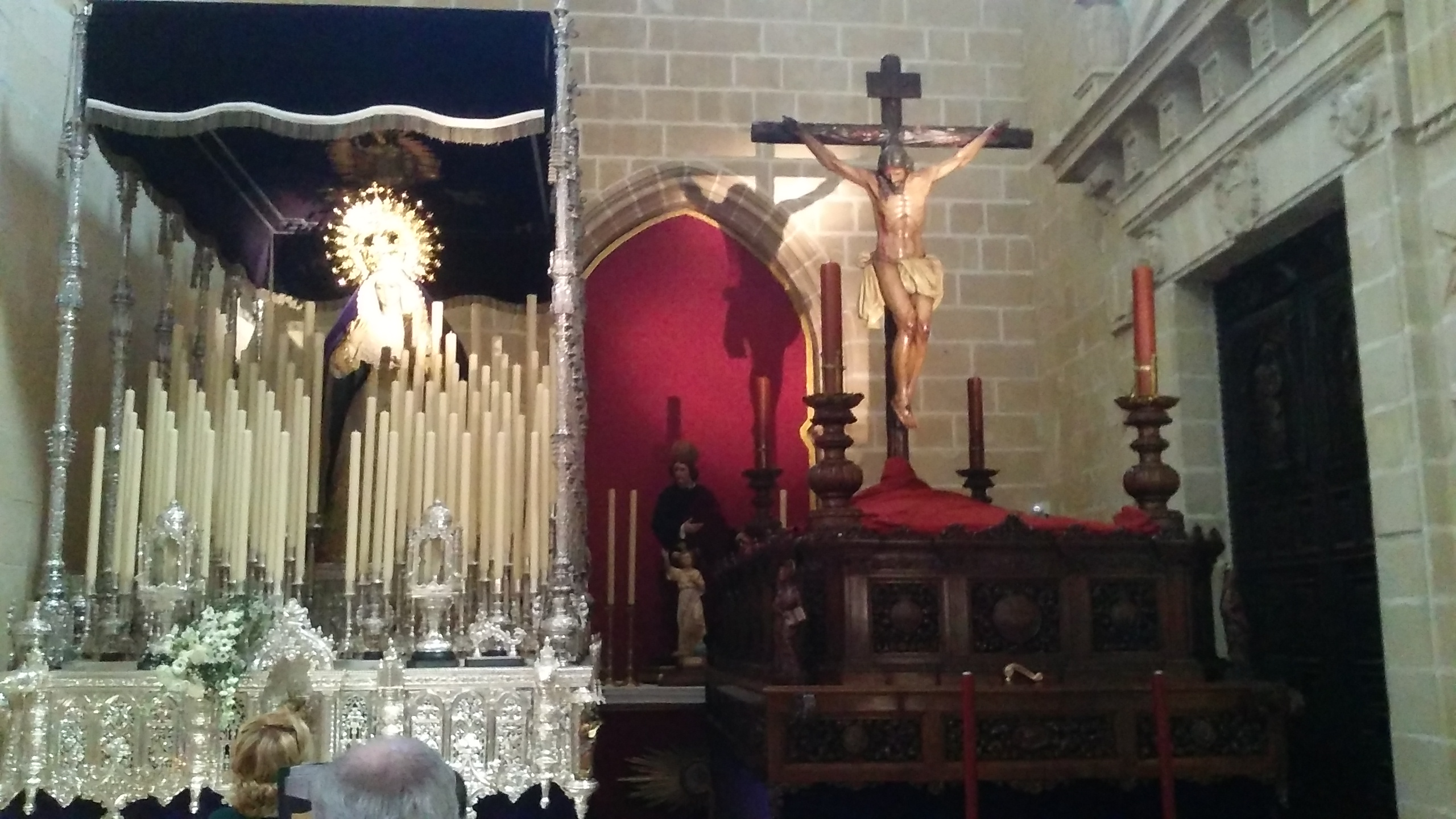 pasos de la hermandad de la Buena Muerte Jerez